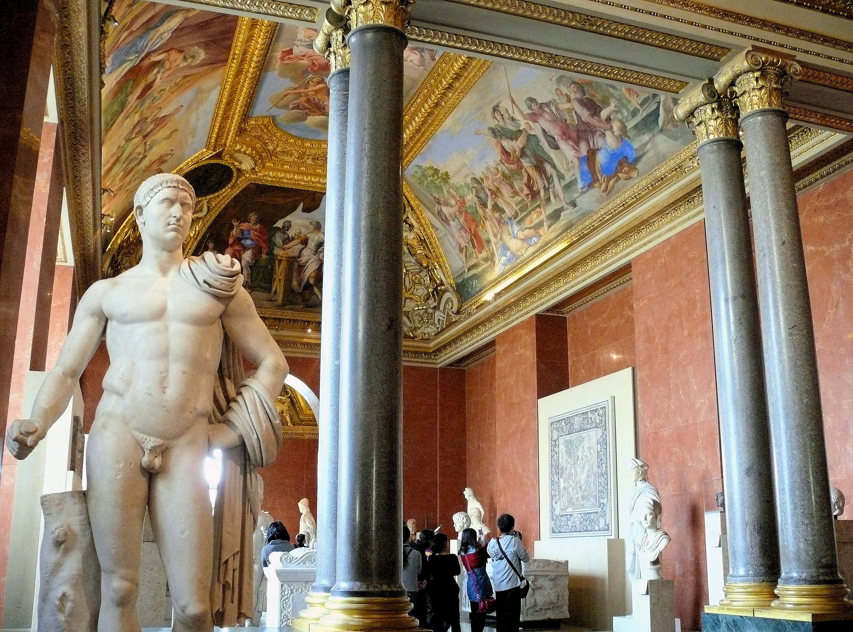 Palais du Louvre - Appartements d'été de la reine Anne d'Autriche - Antiquités romaines. Principalement la salle 25 avec au mur la mosaique du Jugement de Paris. Et au premier plan la statue de l'empereur Othon de la salle 24.